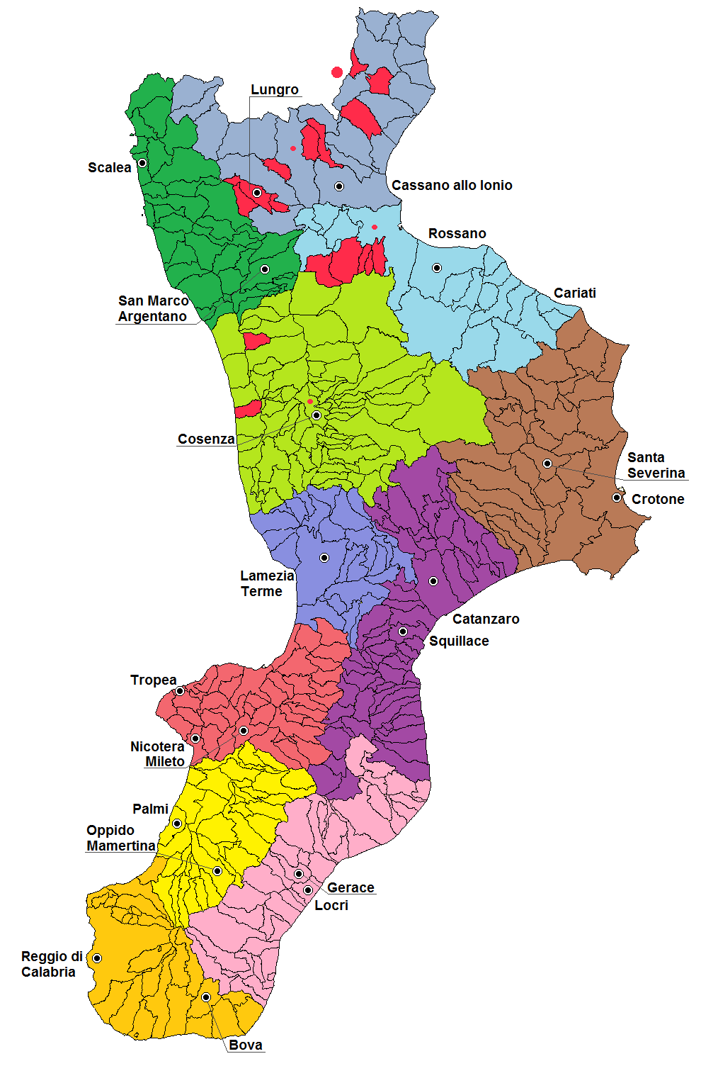 Mappa delle sedi vescovili della Calabria